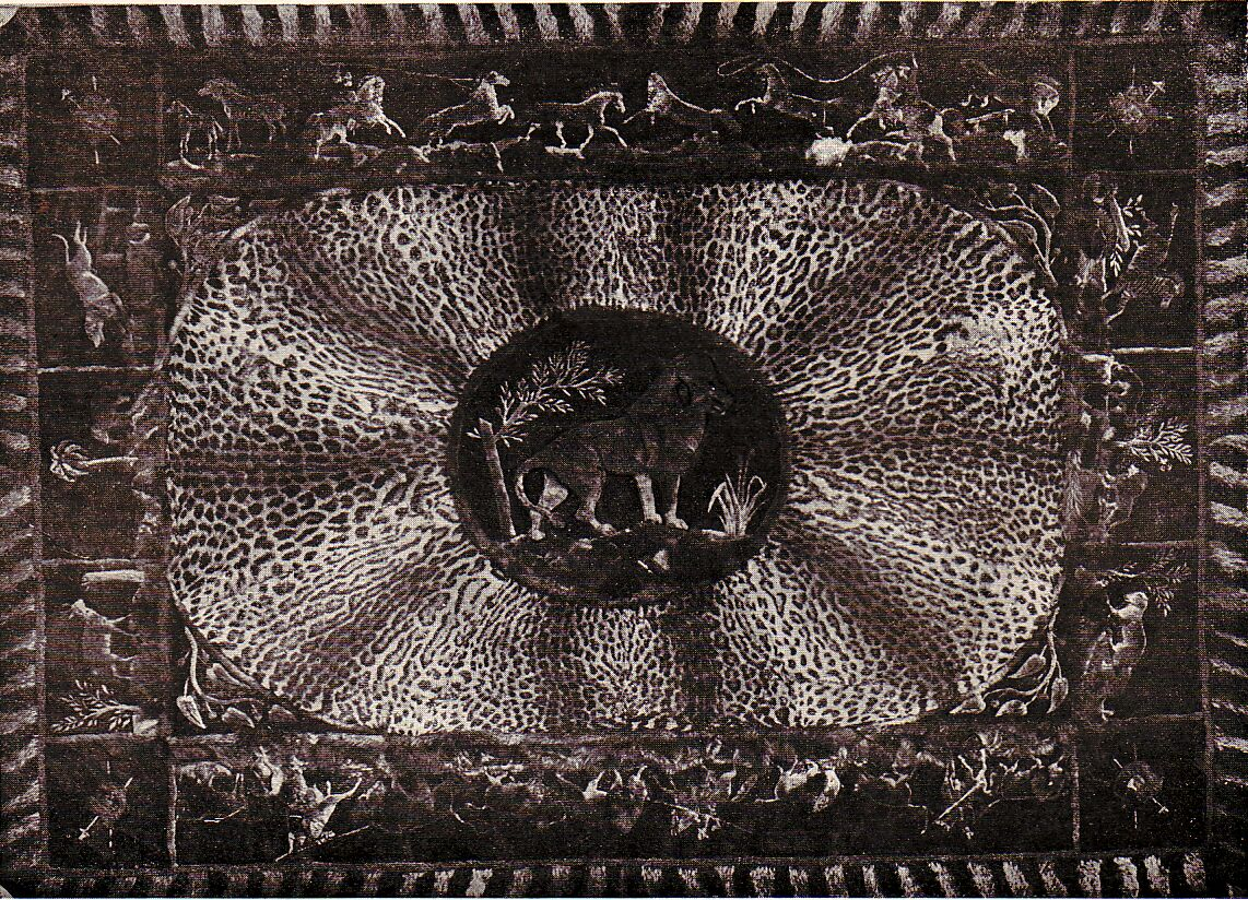 Bildunterschrift: Wandteppich für Jagd oder Sportzimmer. Fot. Repr. 1/15 nat. Größe (= 14,7 x 10,2 cm). Ausgeführt von der Firma BODE, Dresden. Die Mitte ziert ein aus gerupfter nat. Otter geschnittener Löwe. Das „Feld“ ist mit schöngefleckten Tigerkatzen (offensichtlich jedoch Ozelots) ausgefüllt, deren gelbschwarze Tönung vorteilhaft mit der Färbung der Mosaik harmoniert. Am kunstvollsten ist die Umrahmung gehalten. Die obere Partie zeigt das Einfangen von Pferden mit Lassos; die rechte Seite ein Zebra, Löwin und Löwe und einen Fuchs. Die untere Partie, eine Büffeljagd, die linke Seite ein Reh, Elephanten und einen Hund. Die 4 Ecken endlich zeigen Schilder und Jagdwaffen. Sämmtliche Figuren sind aus nat. Otter geschnitten und teils in den Grund eingenäht, teils aufgesetzt.